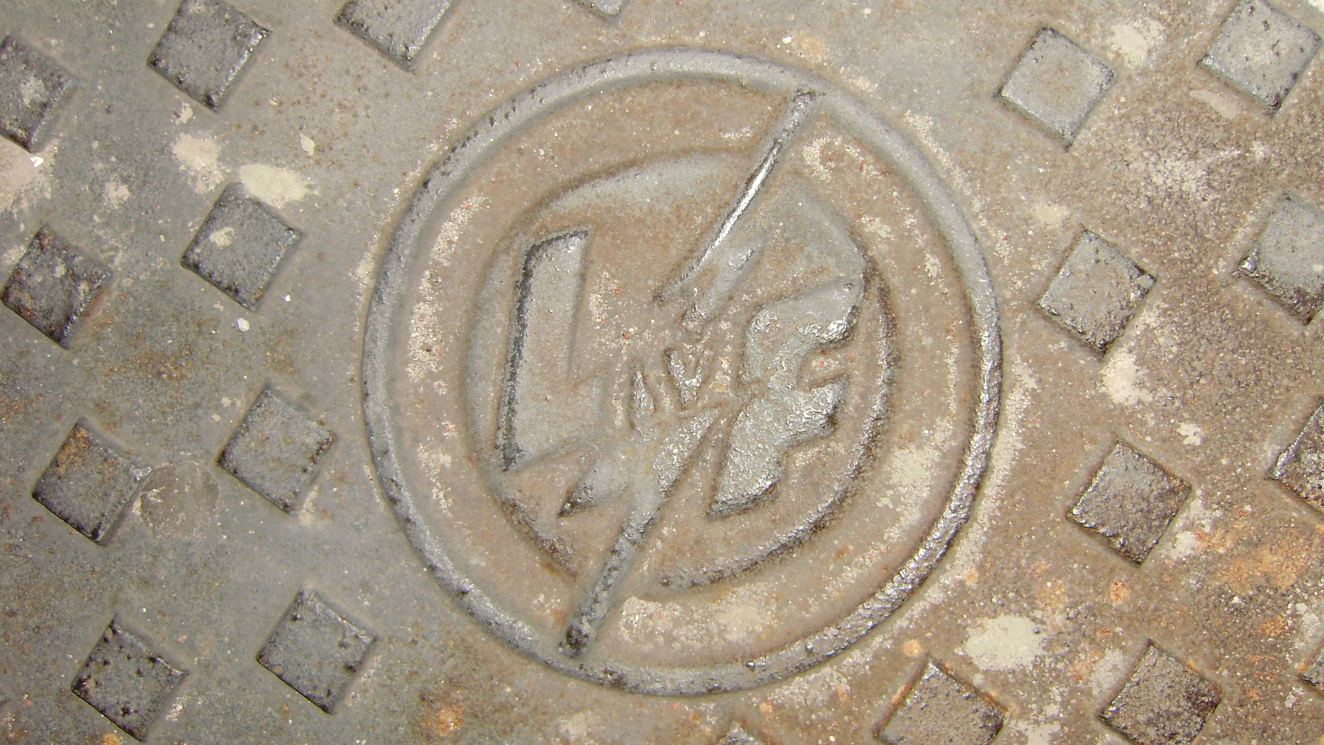 Alcantarilla con el emblema de Luz y Fuerza del Centro.